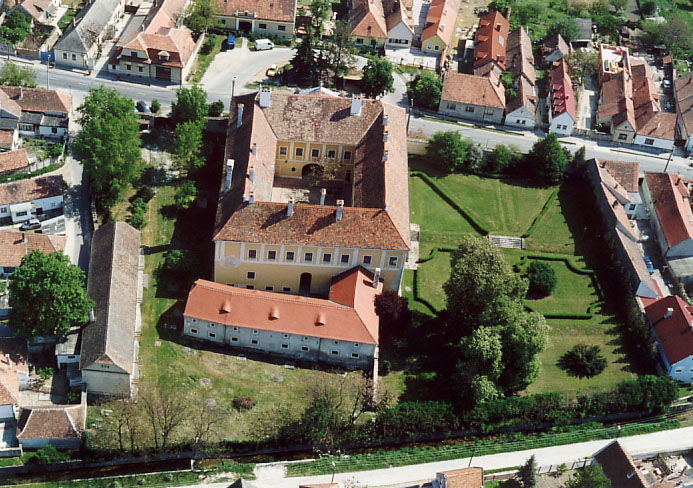 Fertőrákos, püspöki palota This is a photo of a monument in Hungary. Identifier: 4111